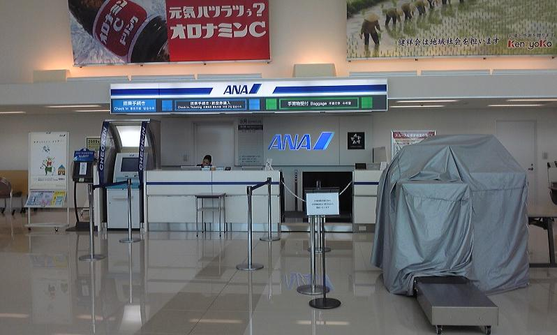 徳島阿波おどり空港内にあるANAカウンター。